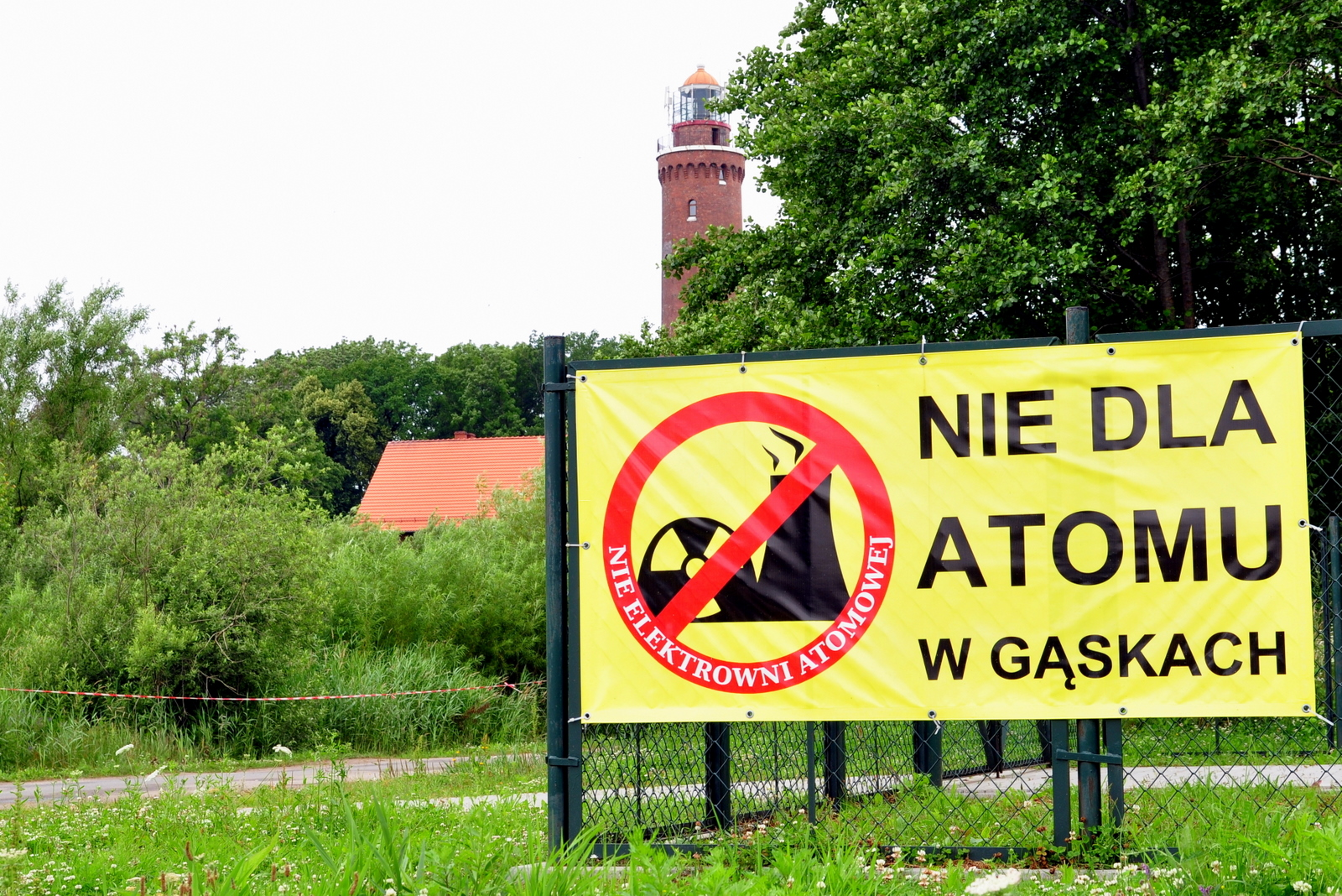 Społeczność Gąsek sprzeciwia się budowie elektrowni atomowej.